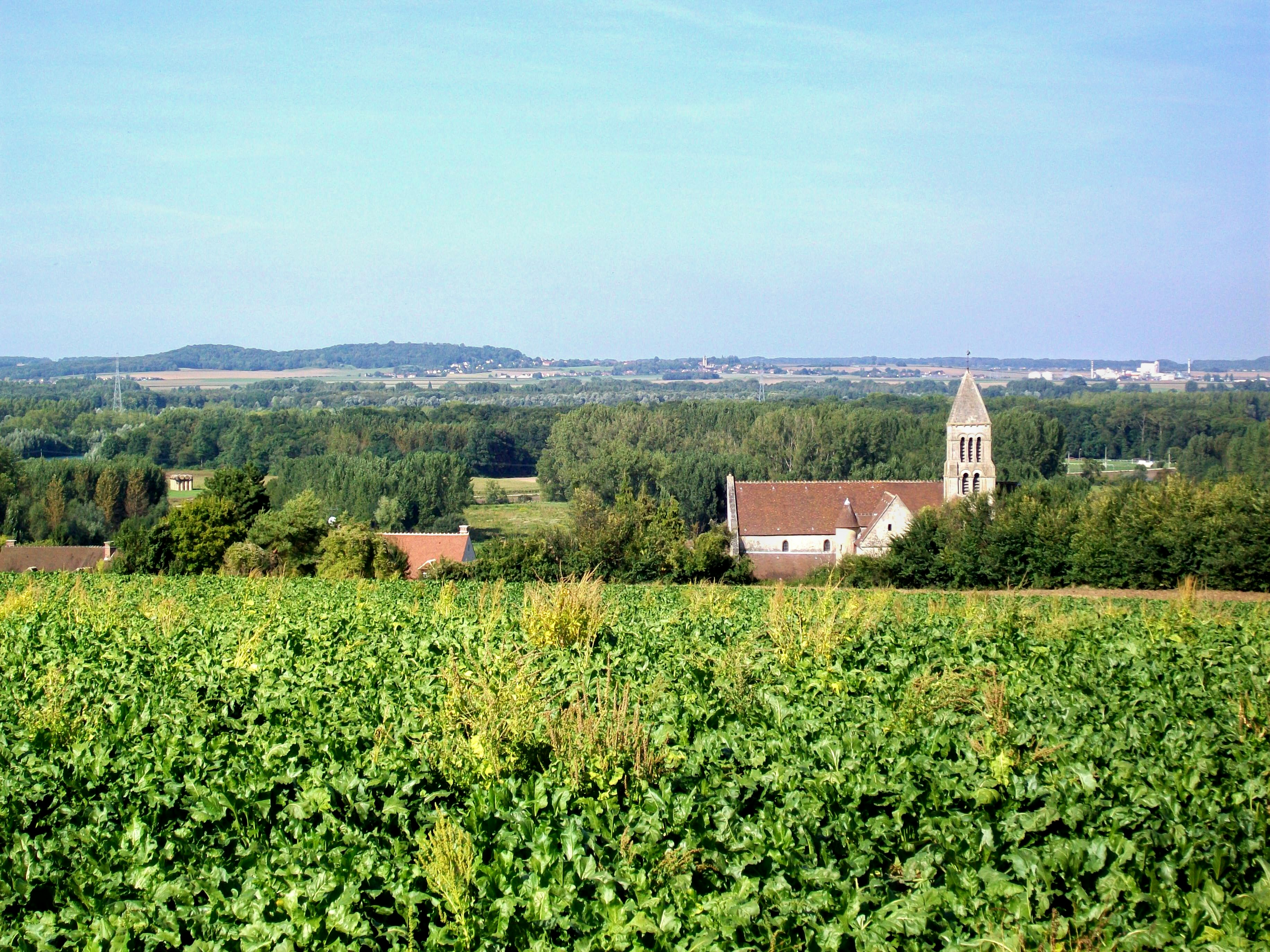 Vue sur l'église Saint-Gervais depuis le sud, avec la vallée de l'Oise au fond ; le village de Pontpoint est caché derrière la pente.